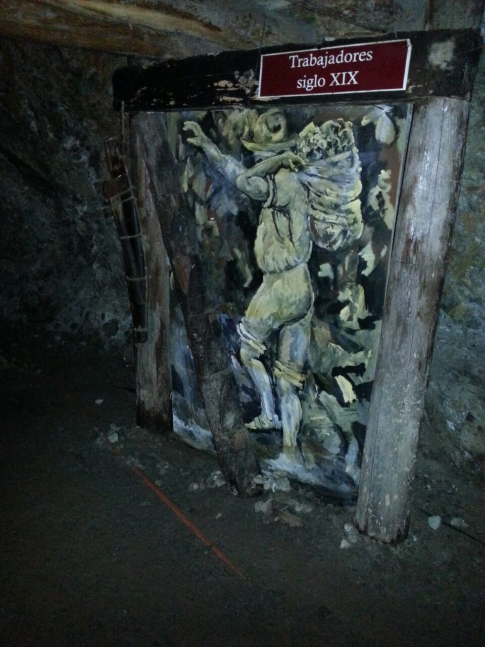 Trabajadores siglo XIX "Mina Acosta"